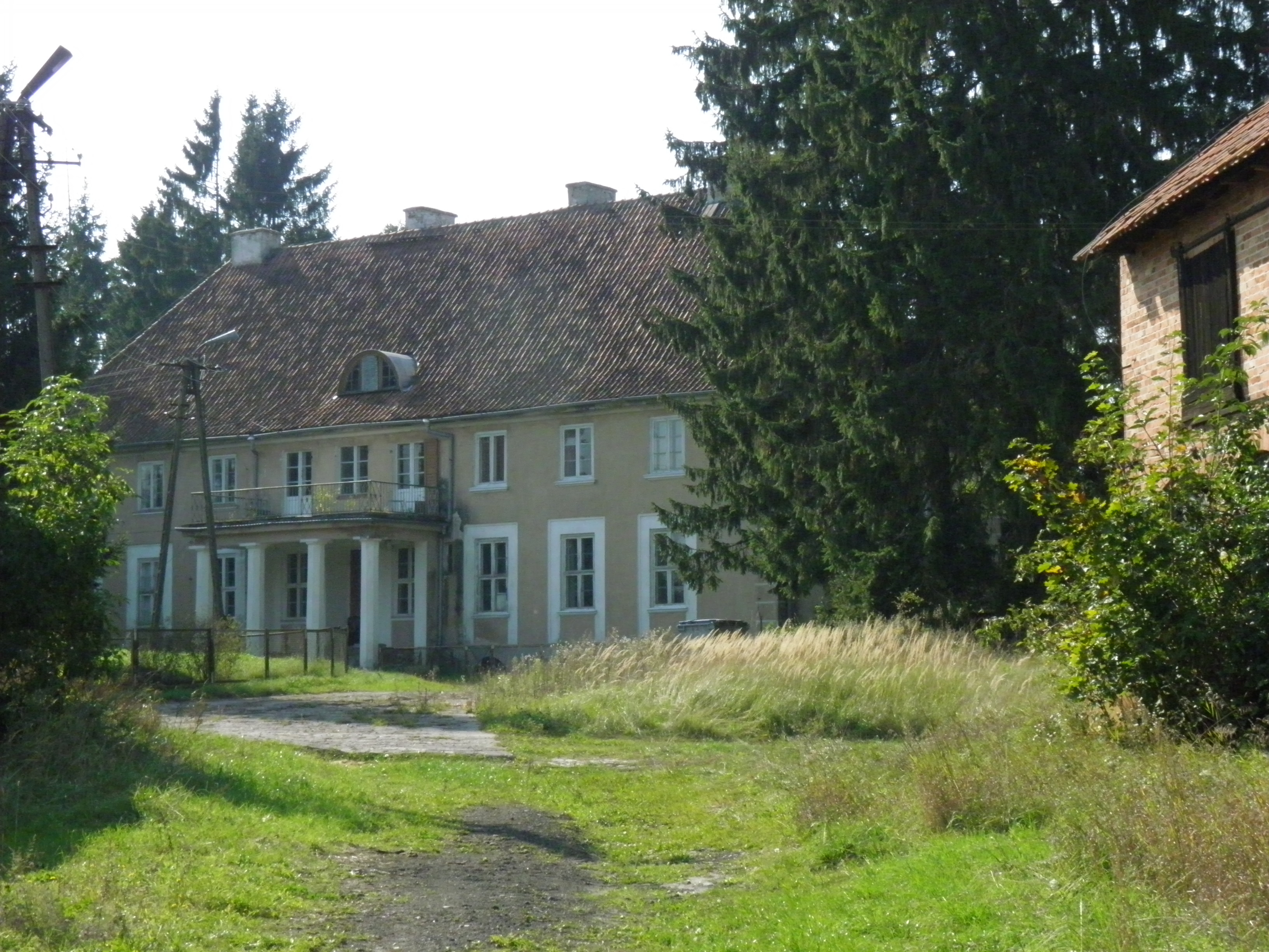 Gawliki Małe, dwór, po 1920